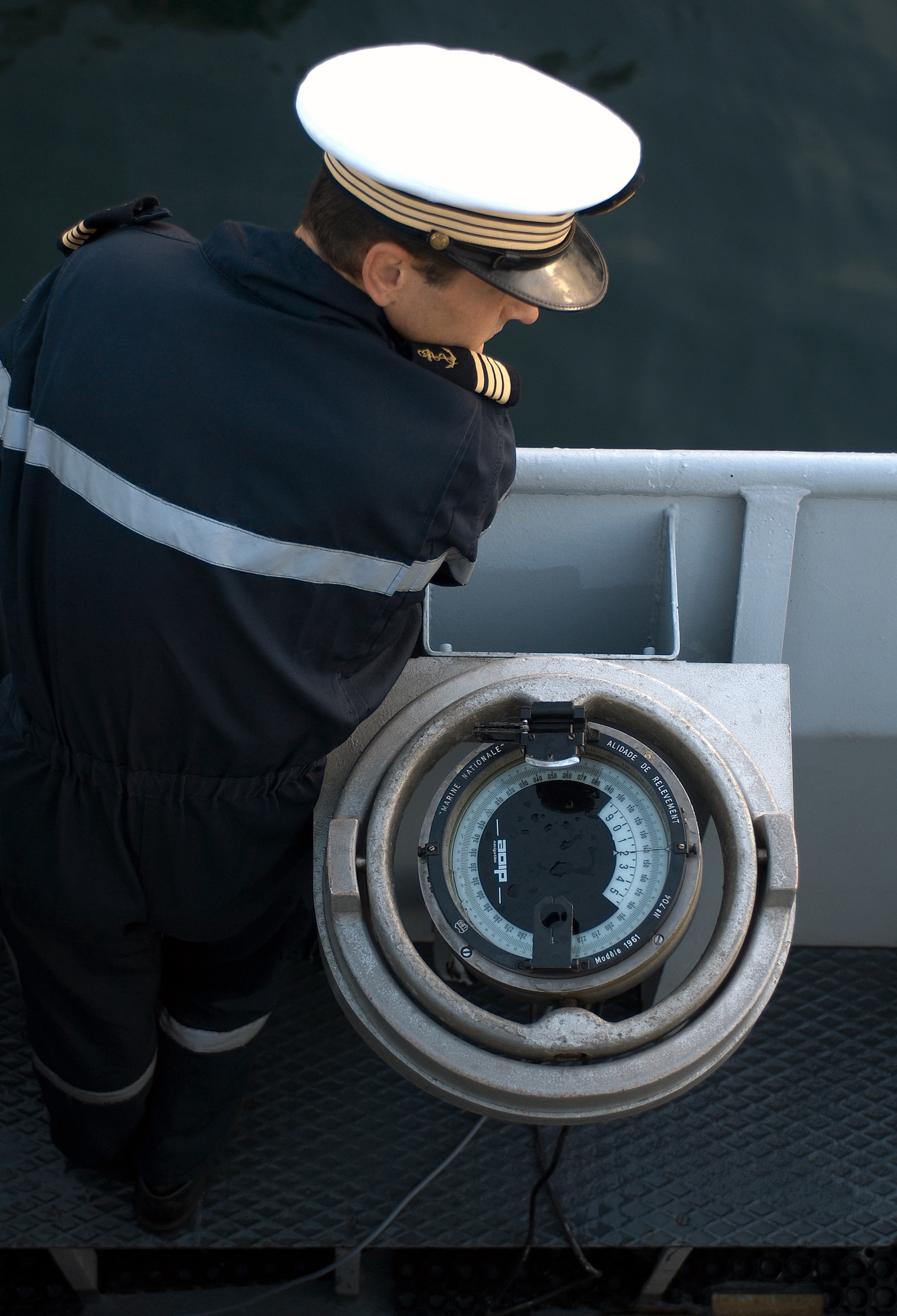 Le commandant prend la manoeuvre.